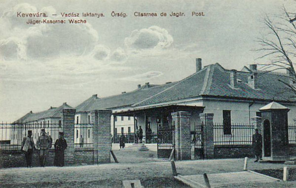 Wache der k.u.k. Jägerkaserne in Kevevára